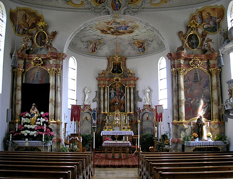 Pfarrkirche St. Laurentius (Reinhartshausen, Stadt Bobingen, Landkreis Augsburg, Bayerisch-Schwaben). Innenansicht nach Osten. Eigene Aufnahme, Mai 2007 / Parish church St. Laurentius (Reinhartshausen near Bobingen, Bavaria, Germany). Interior, looking east. Own photo, May 2007